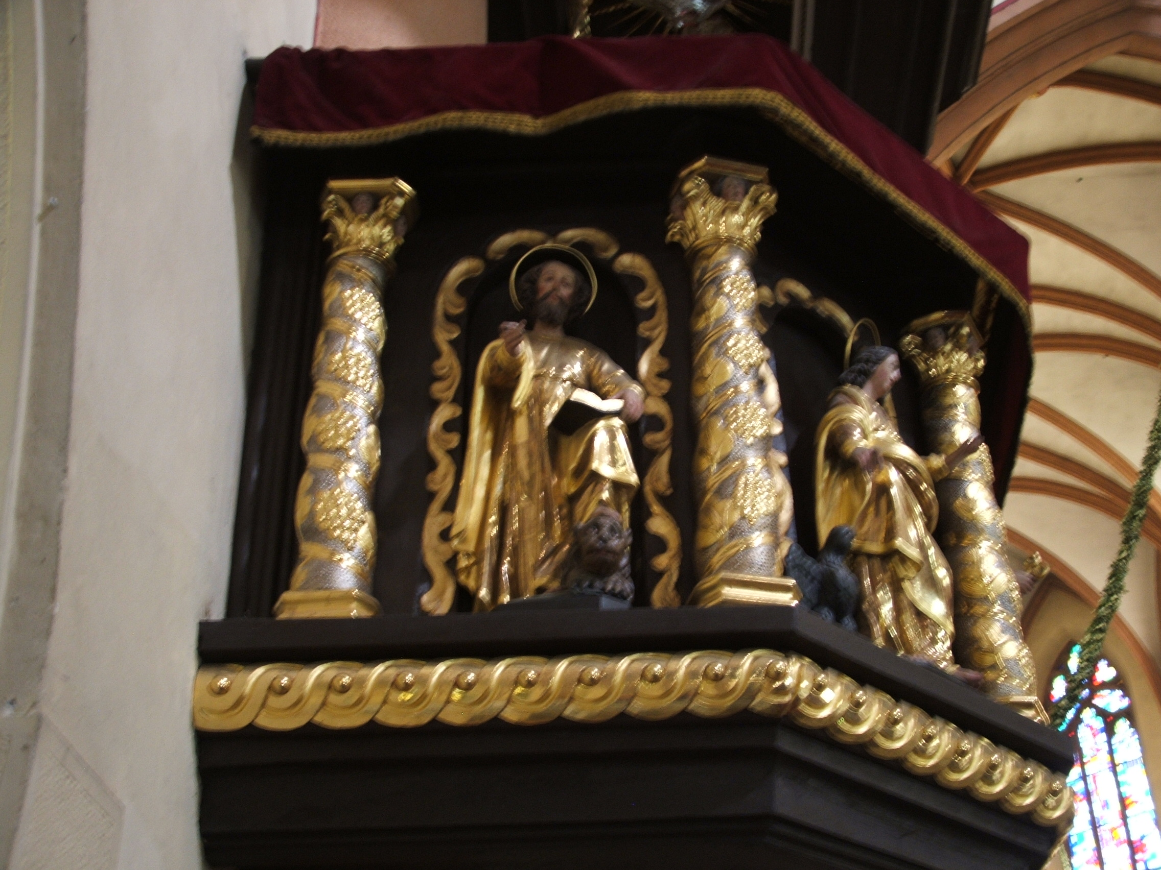 Maribor